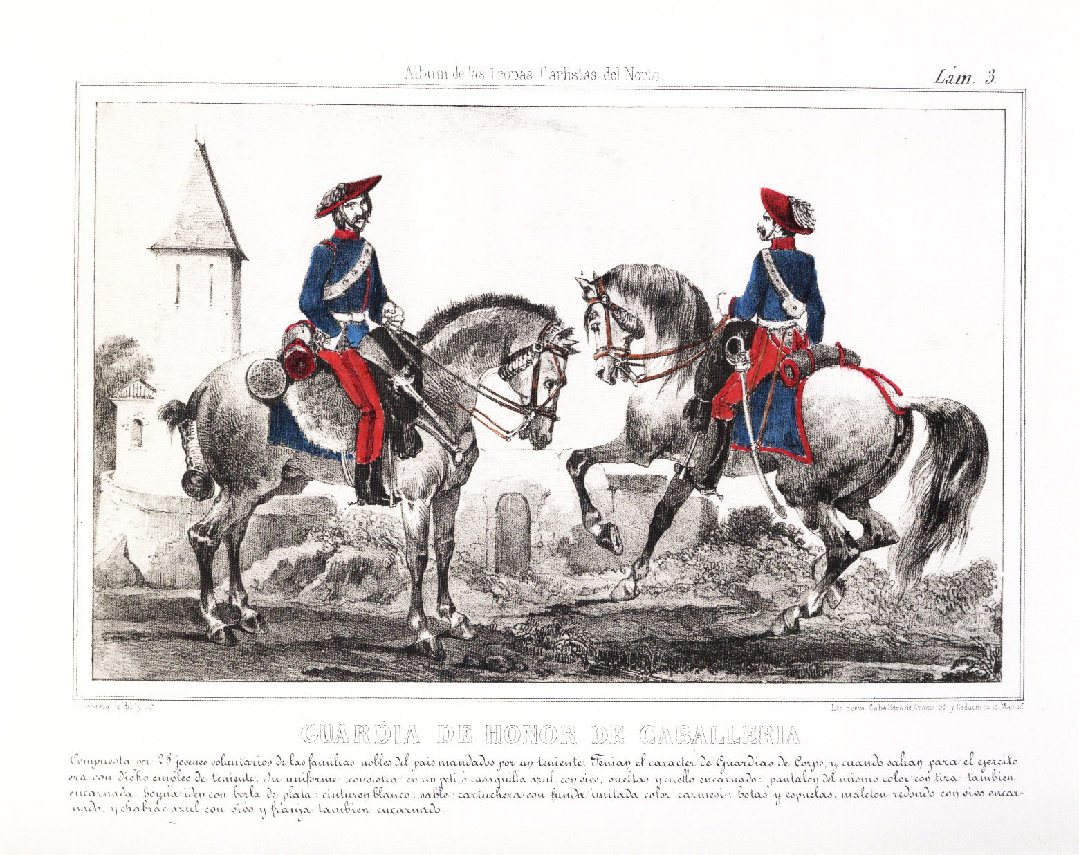 Guardia de Honor de Caballería. "Albúm de las Tropas Carlistas del Norte". Madrid, sin fecha. (184?)